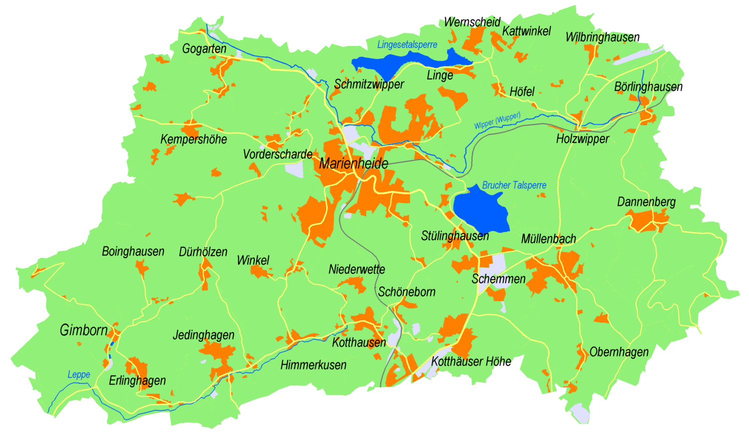 Karte von Marienheide, Oberbergischer Kreis, Deutschland